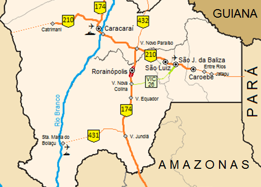 Mapa Rodoviário Sul do Estado de Roraima, Brasil. Esse mapa foi feito derivando-se a imagem livre